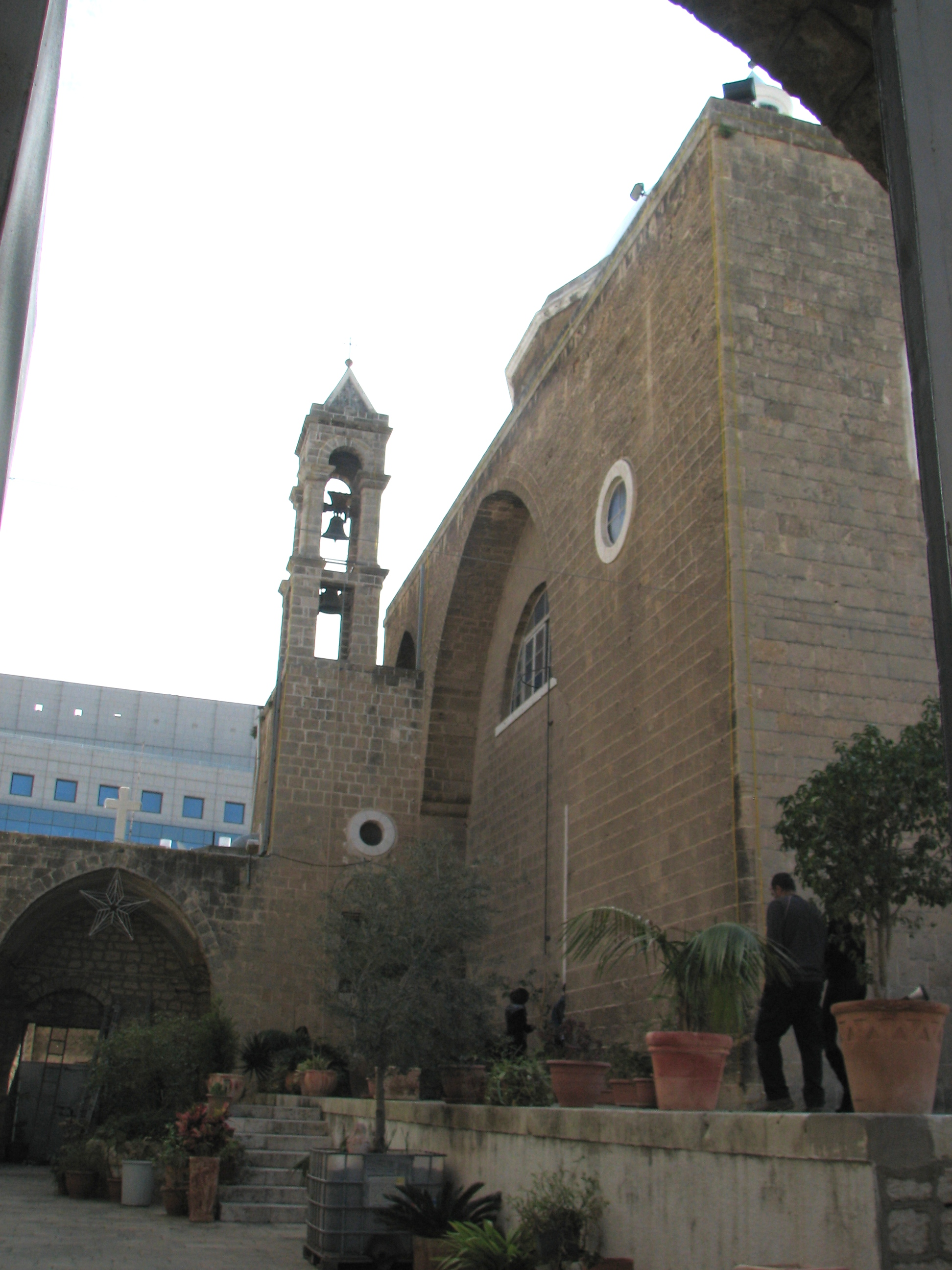 PChurch – Paroisse Maronite St. Louis, Haifa הכנסייה המרונית בעיר התחתית בחיפה ליד כיכיר פריס